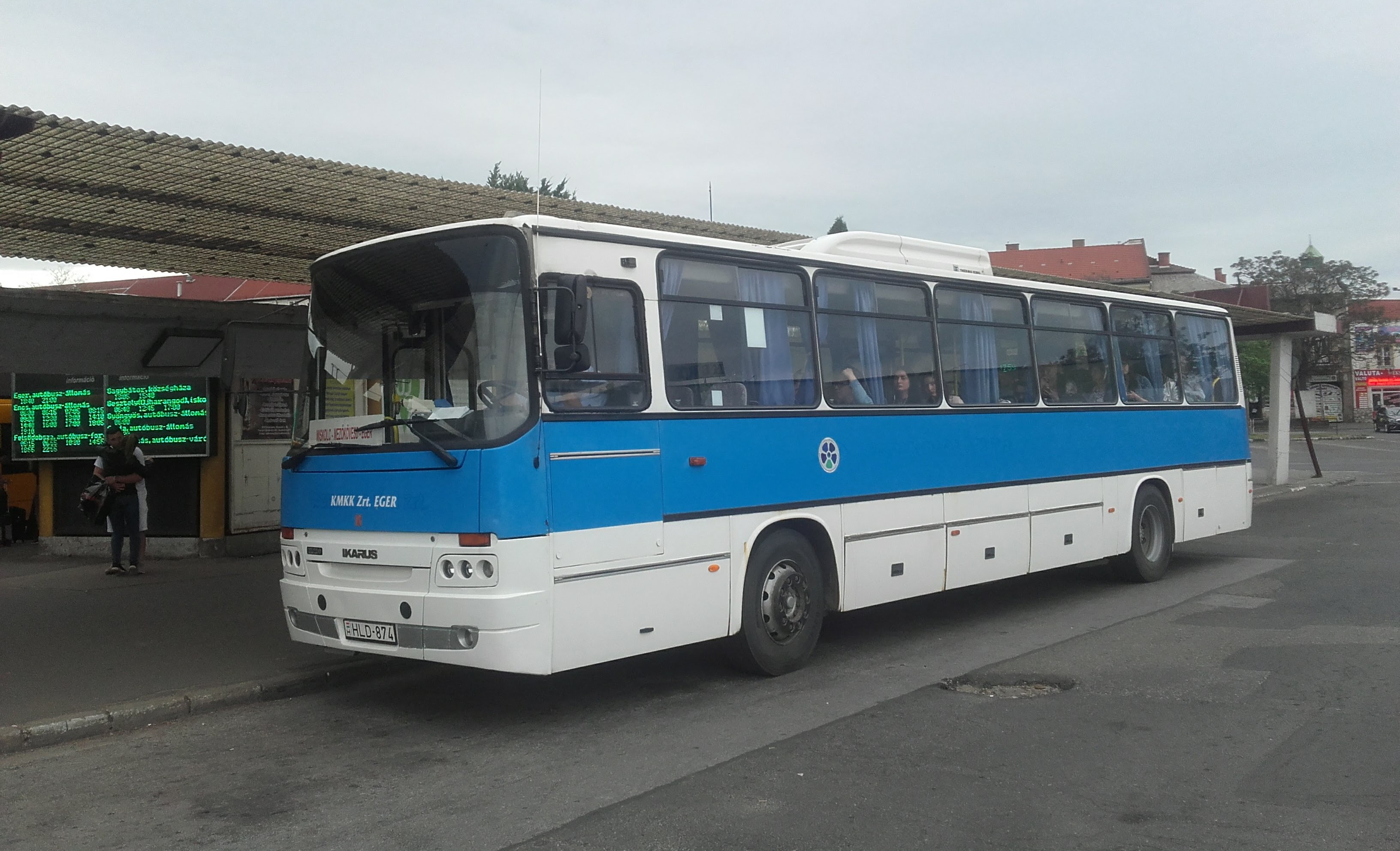 A KMKK HLD-874 rendszámú Ikarus C56 típusú busza Miskolcon, a 1380-as helyközi járaton.